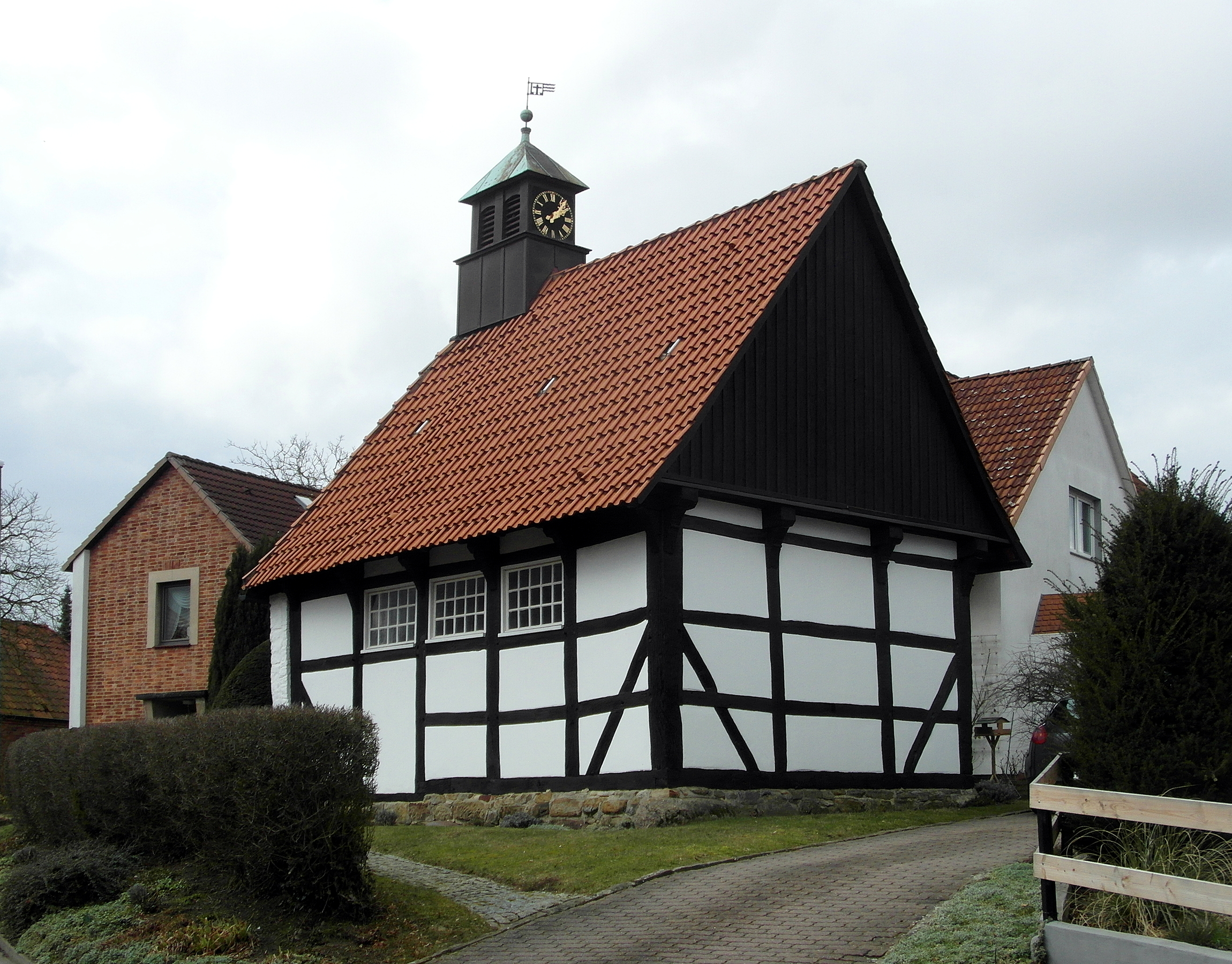 Südseite und Rückfront der Lemmier Kapelle